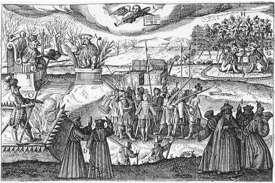 Detail aus einer Flugschrift als Antwort auf den Spottnamen Winterkönig für Friedrich V. von der Pfalz